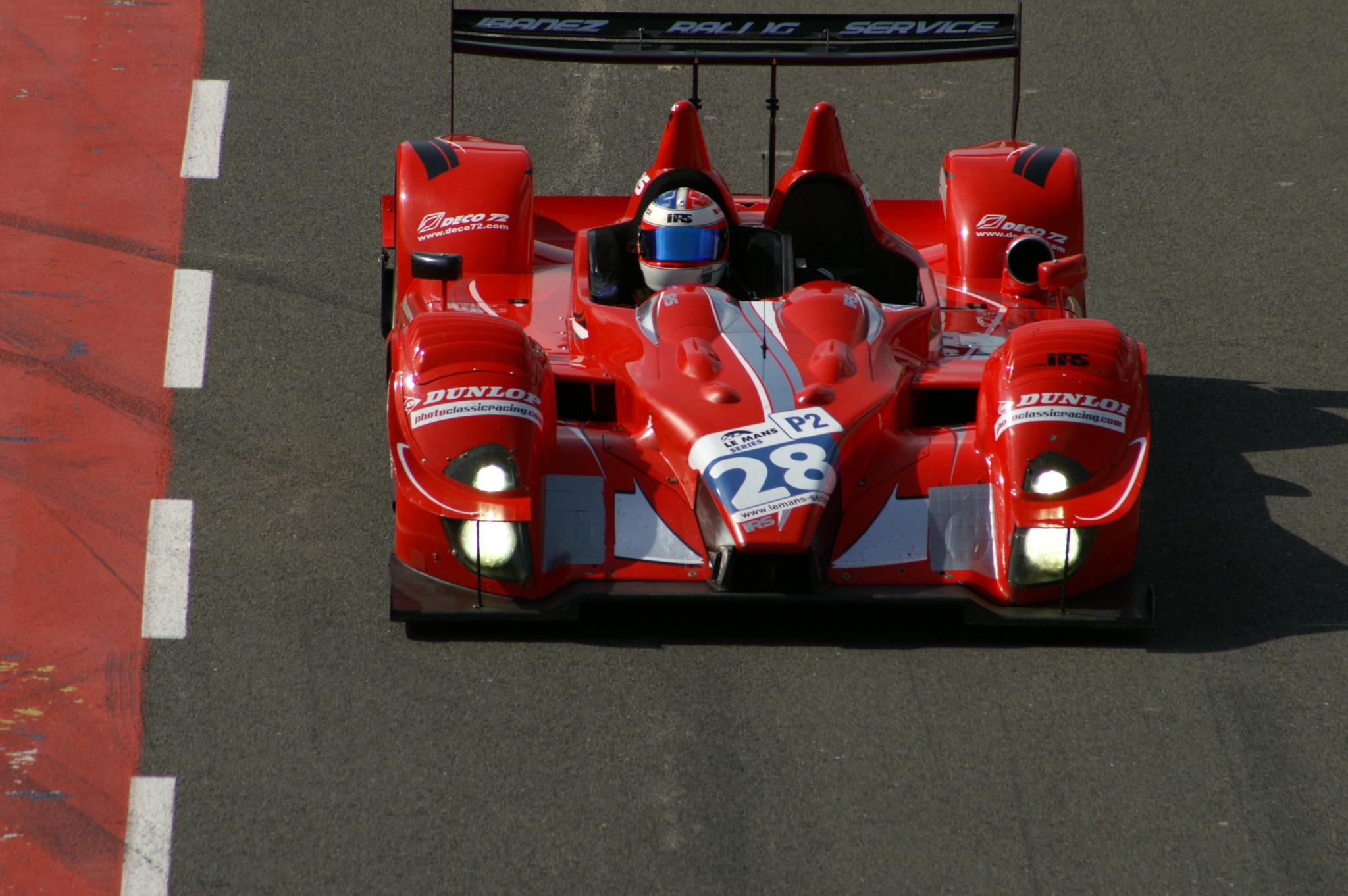 Silverstone Le Mans Series 1000K